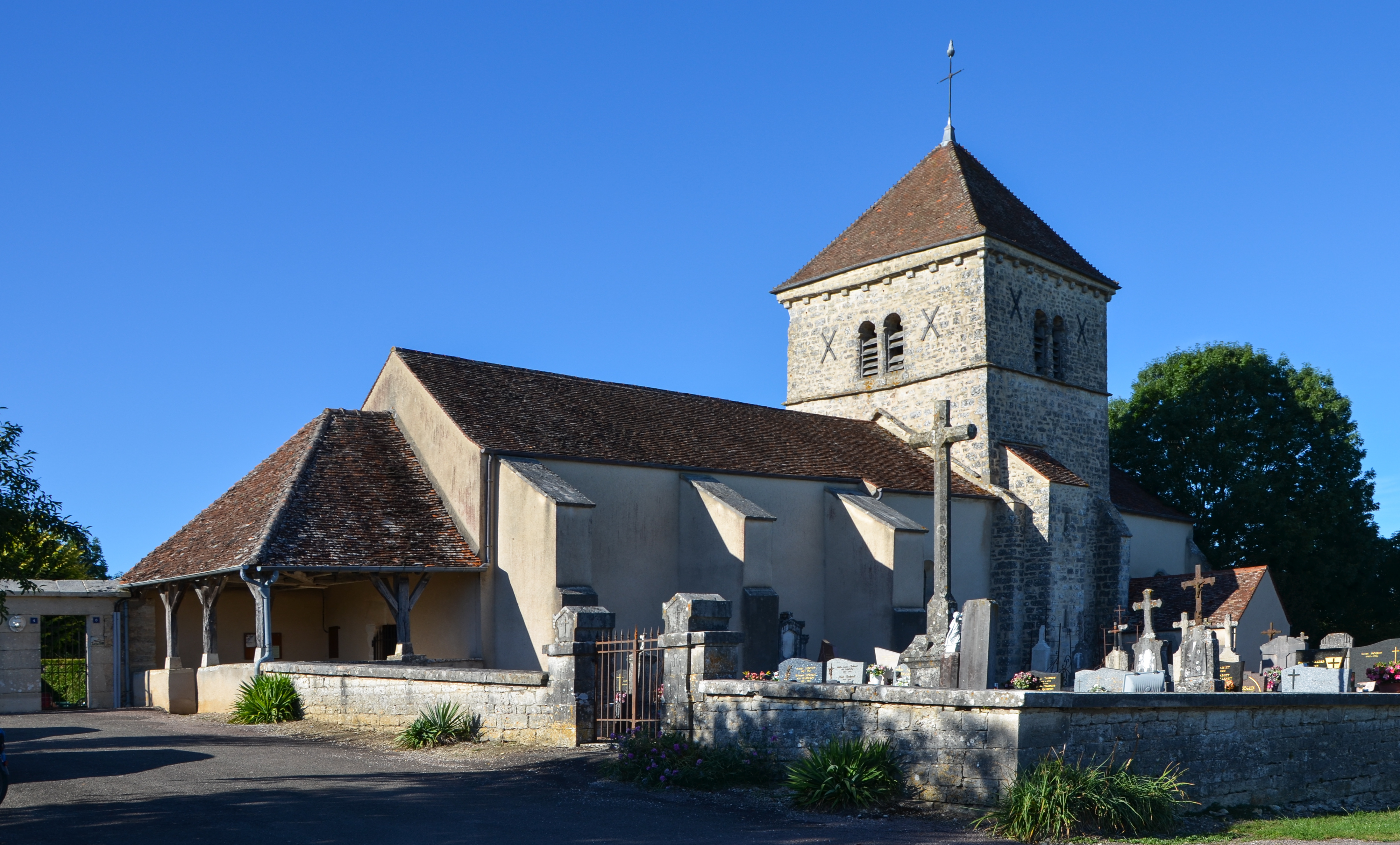 église-d'Oisilly, Côte d'Or, Bourgogne, France .